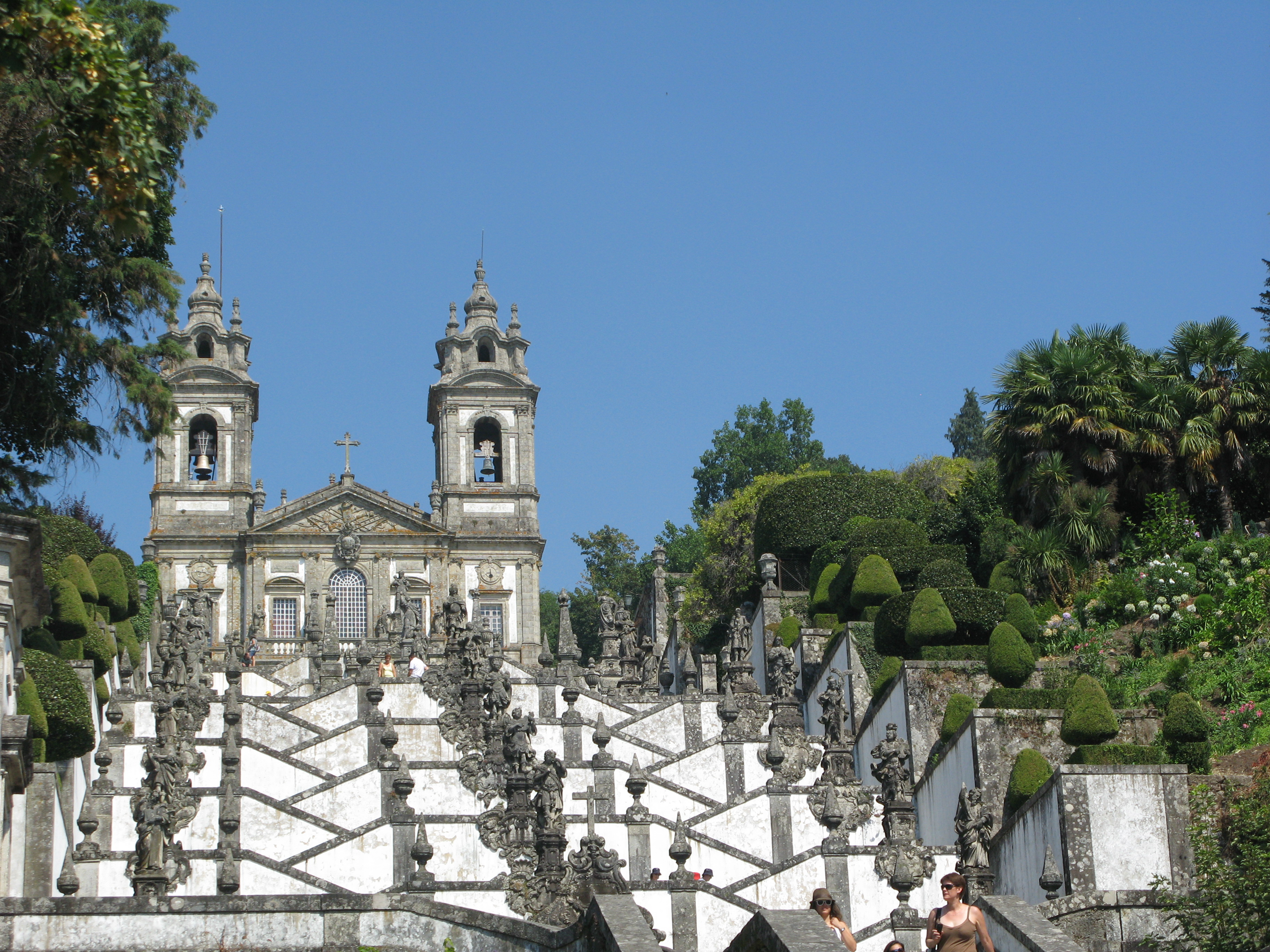 Escadórios do Bom Jesus e as diversas fontes e estátuas localizado nele. Santuário do Bom Jesus do Monte, Braga.